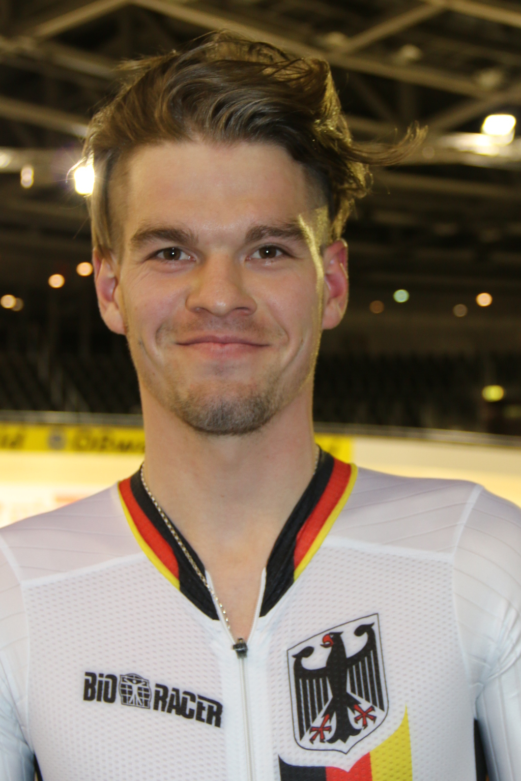 Franz Schiewer, deutscher Radsportler